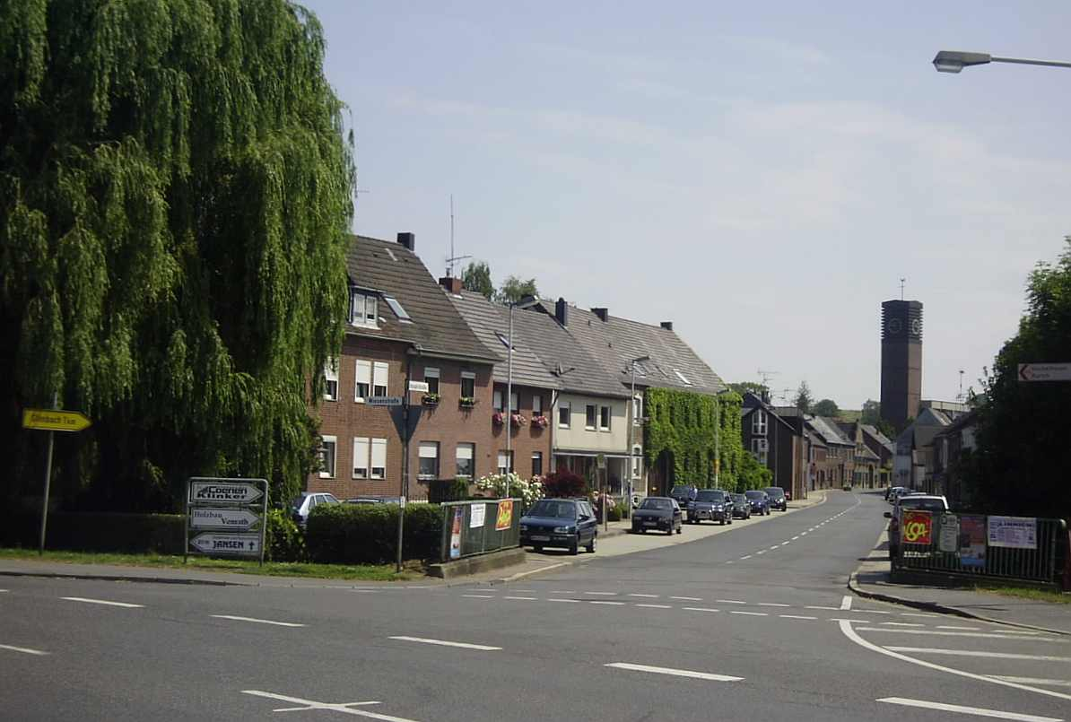 Summary Bildbeschreibung: Linnich Ortsteil Körrenzig Quelle: eigenes Foto. Fotograf/Zeichner: bodoklecksel 16:52, 17. Jun 2006 (CEST) Datum: Juni 2006. Sonstiges: ...